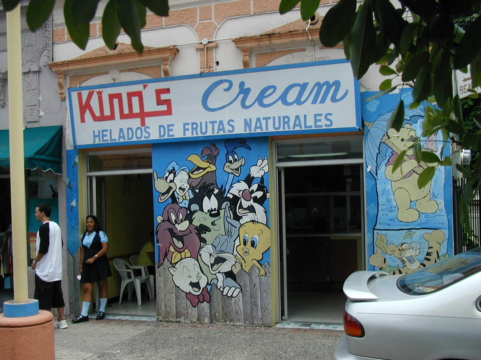 Helados de Frutas Naturales, Yauco, Puerto Rico